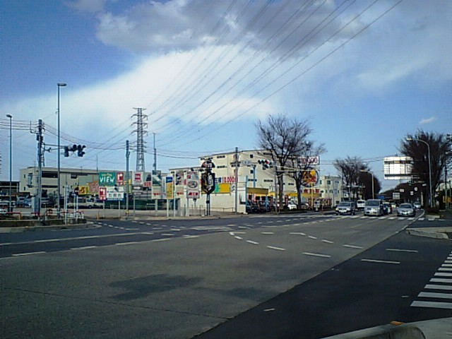 国道463号線松郷（西）交差点（埼玉県所沢市）。現・松郷交差点